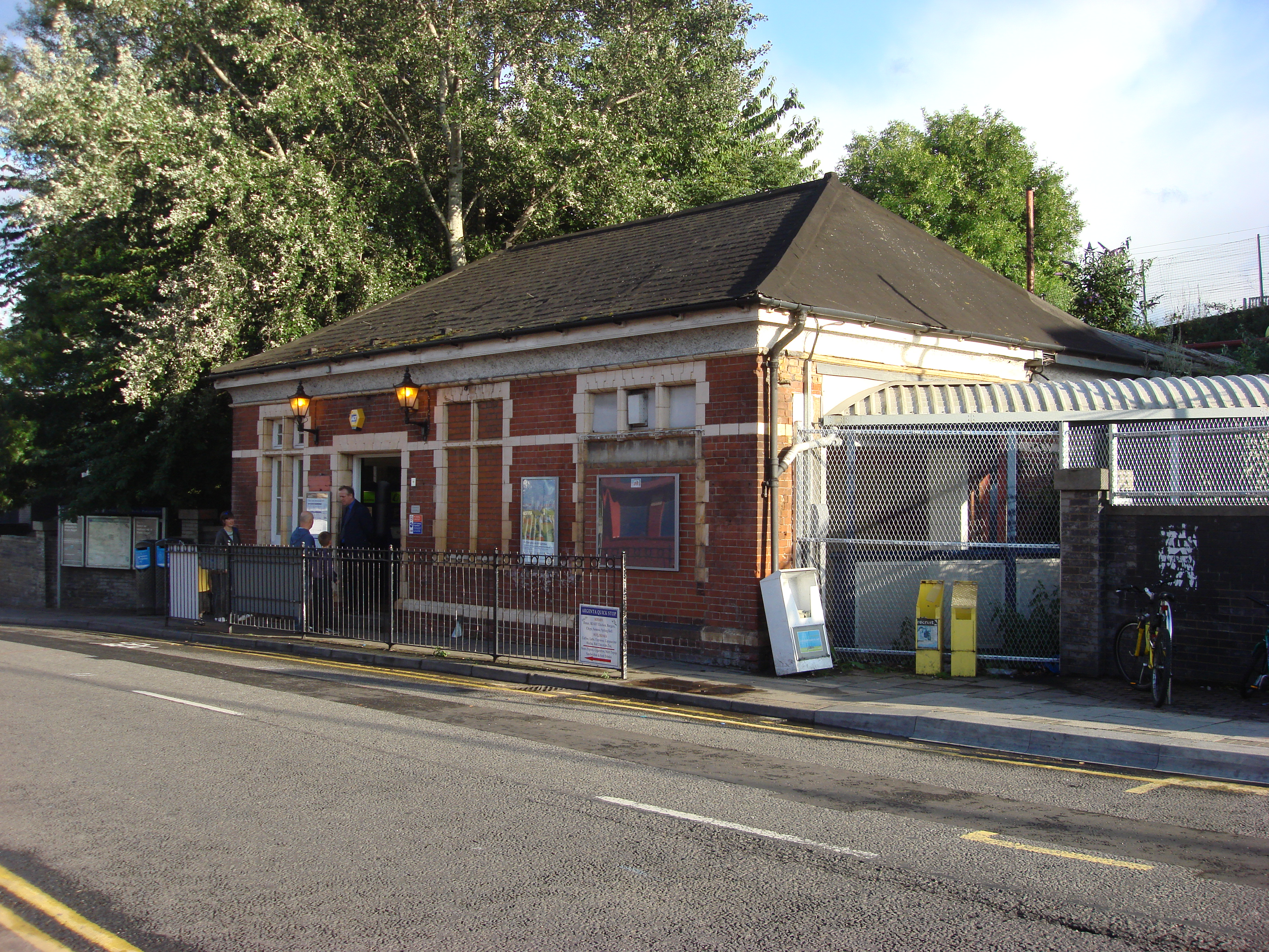 Stonebridge Park station